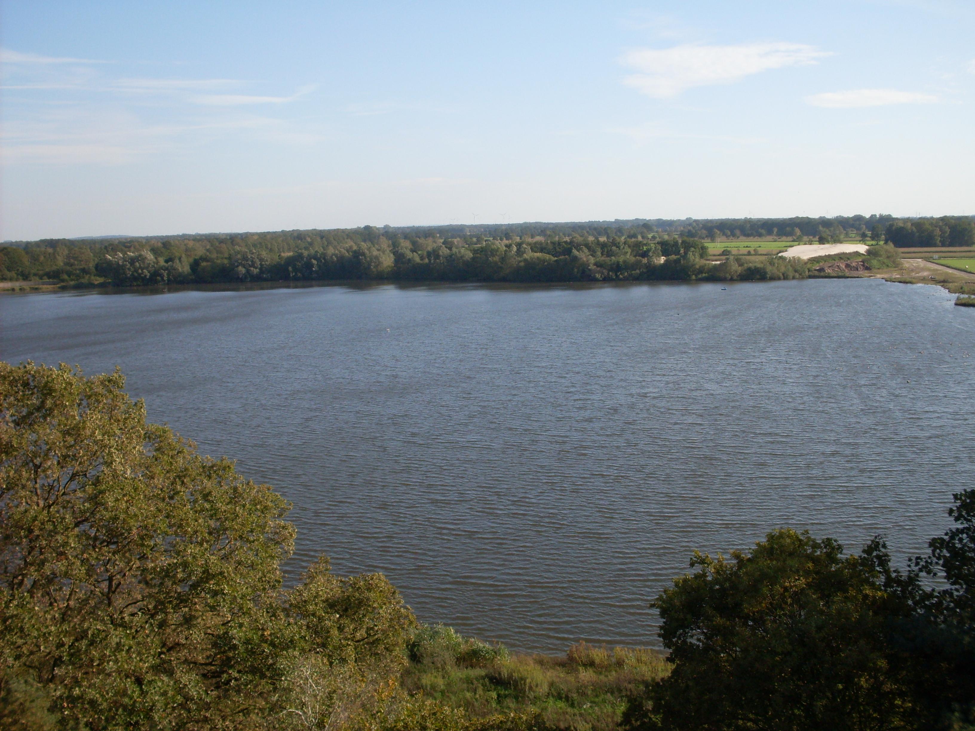 Oelemars vanuit de kijktoren